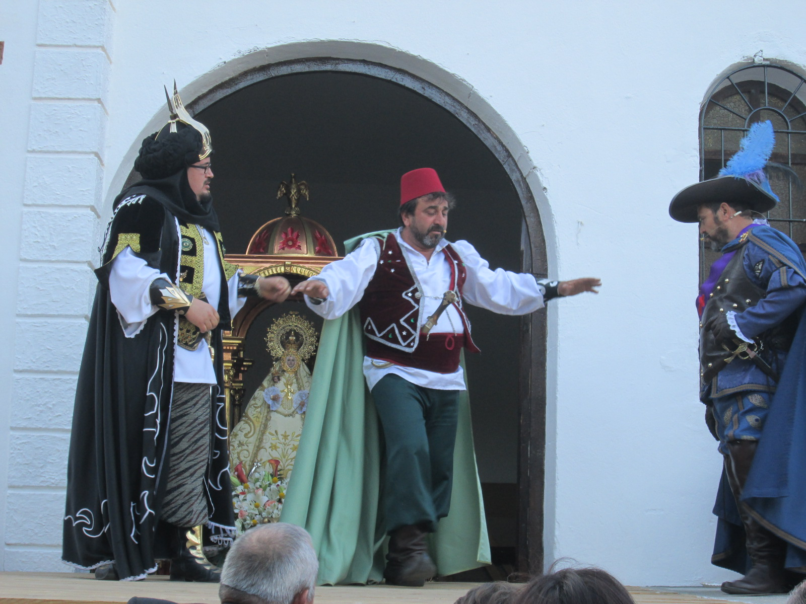 La obra de Zújar cuenta con e00 años de antigüedad.